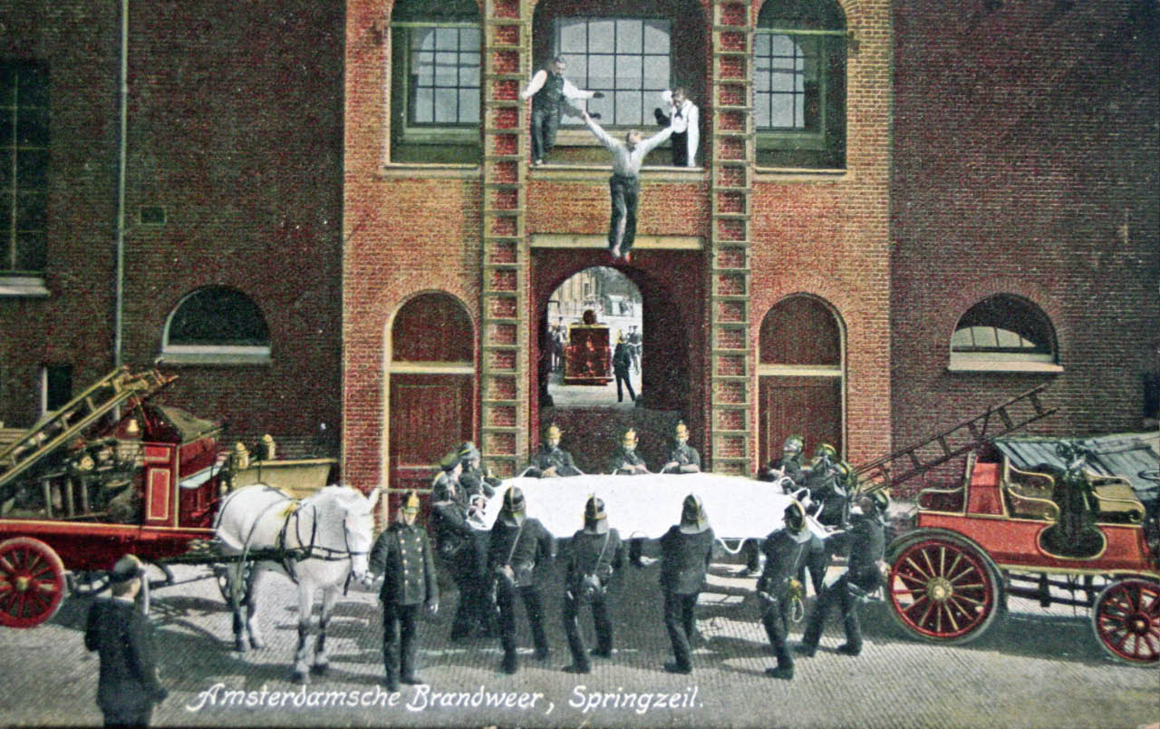 Amsterdamsche Brandweer Springzeil.